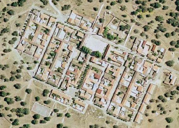 Fotografia aerea de rincón de ballesteros en caceres.